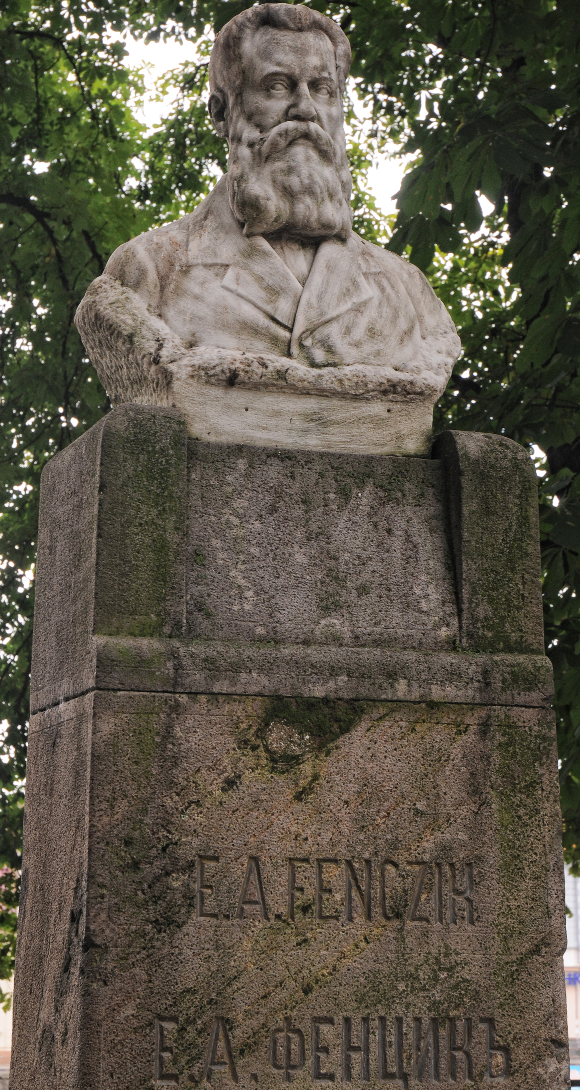 Пам'ятник Е.Фенцику — Закарпатському письменнику І просвіти